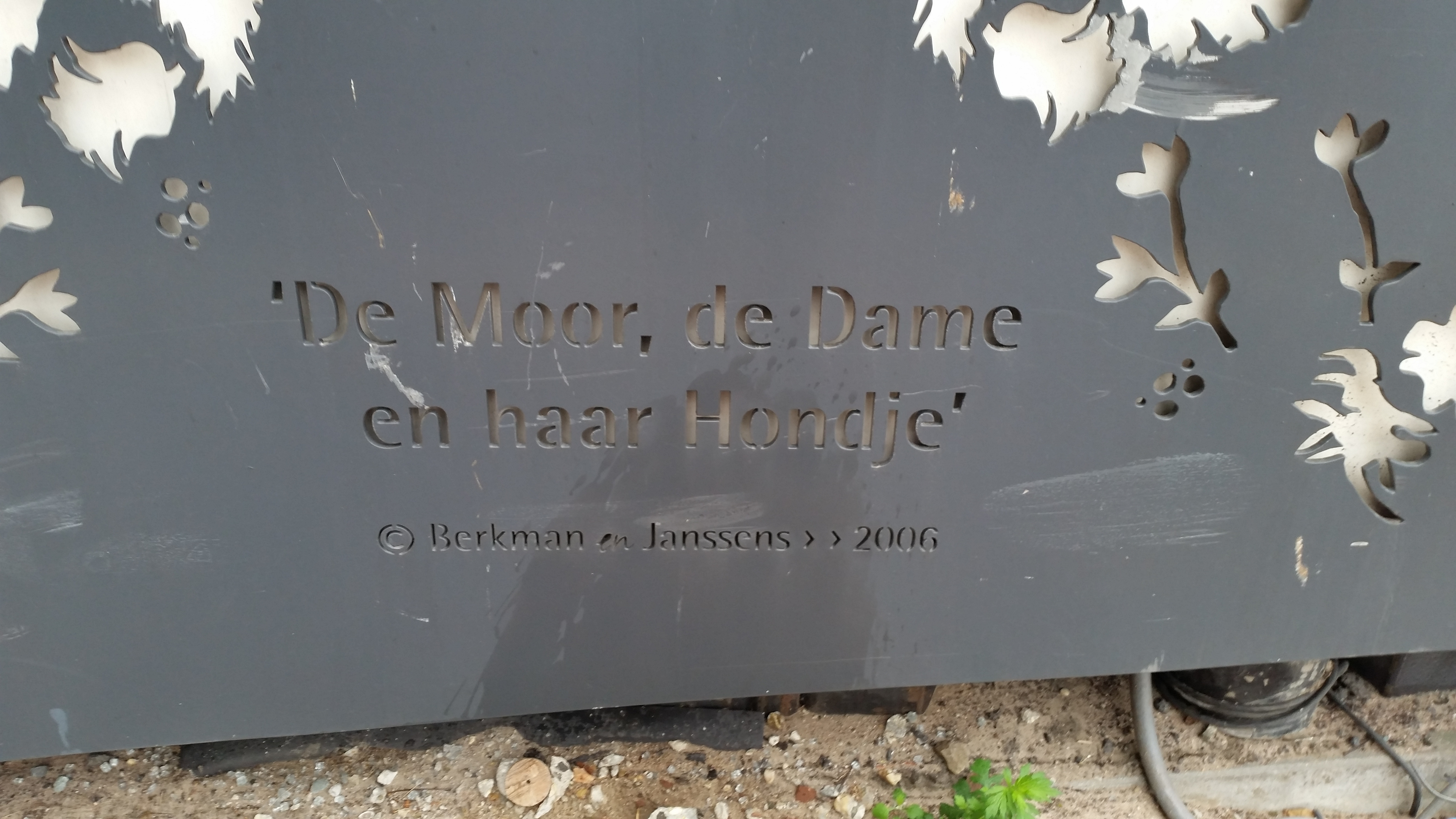 De moor, de dame en haar hondje; titel en auteurs